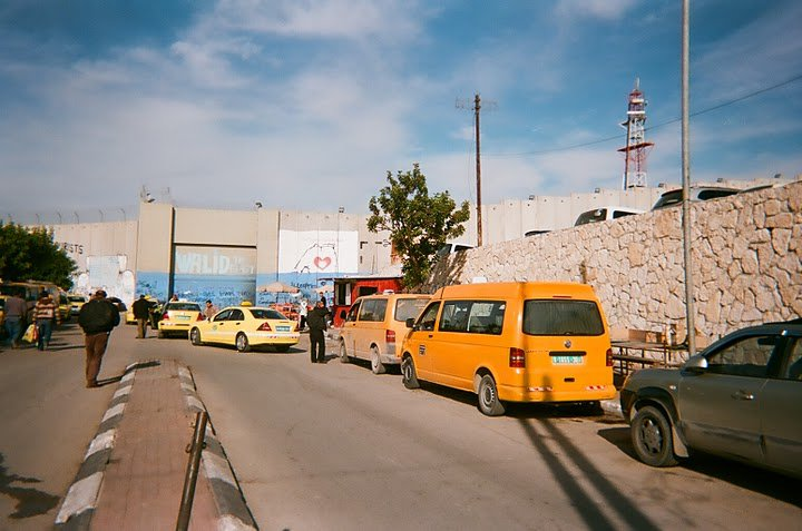 Just across the Bethlehem pedestrian checkpoint on the Palestinian side. All these taxis are waiting to show tourists around or take workers back home when they arrive from Israel or East Jerusalem.